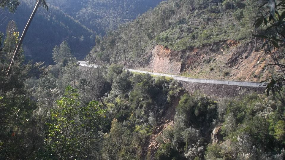 troço cernache do bonjardim - vale da ursa foto 1